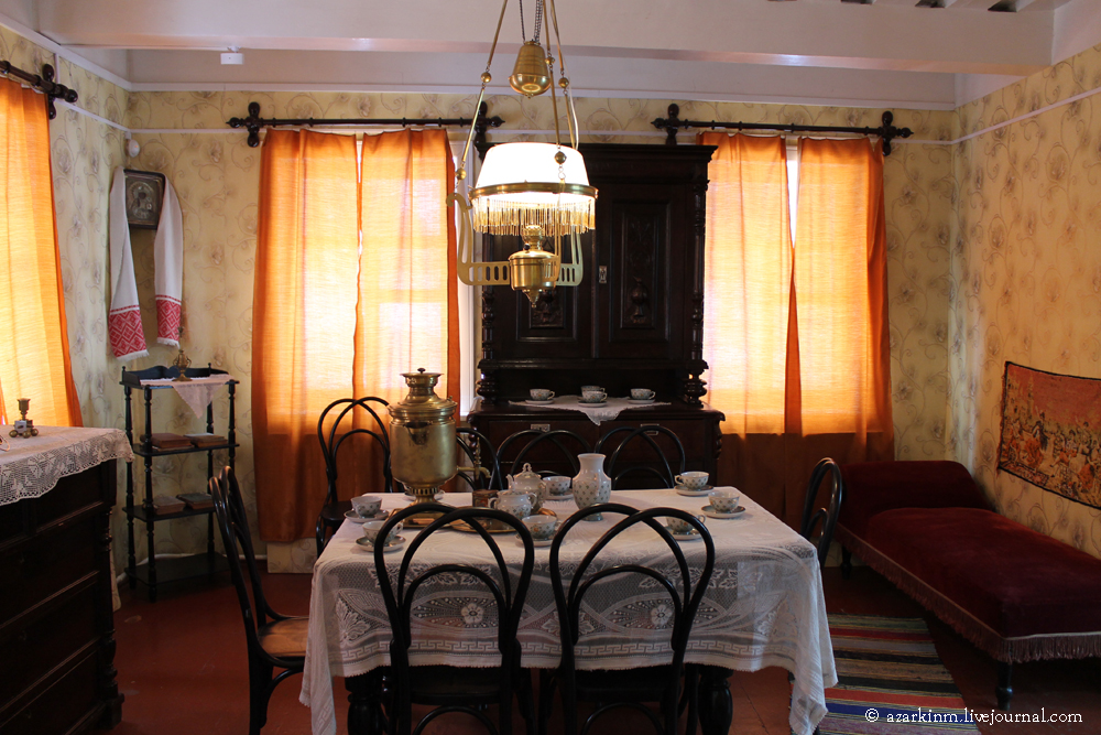 Дом-музей І з'езда РСДРП. Інтэр'ер.